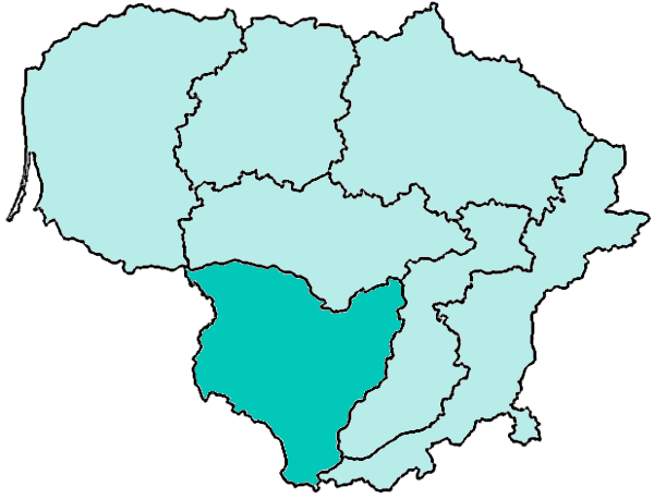 Mappa della diocesi cattolica di Vilkaviškis, in Lituania.